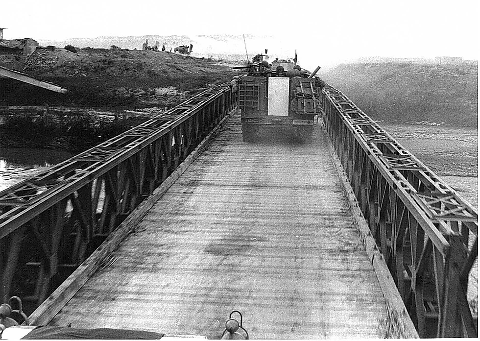 פעולת כראמה, מבצע תופת. טנק שרמן, גשר דמיה.